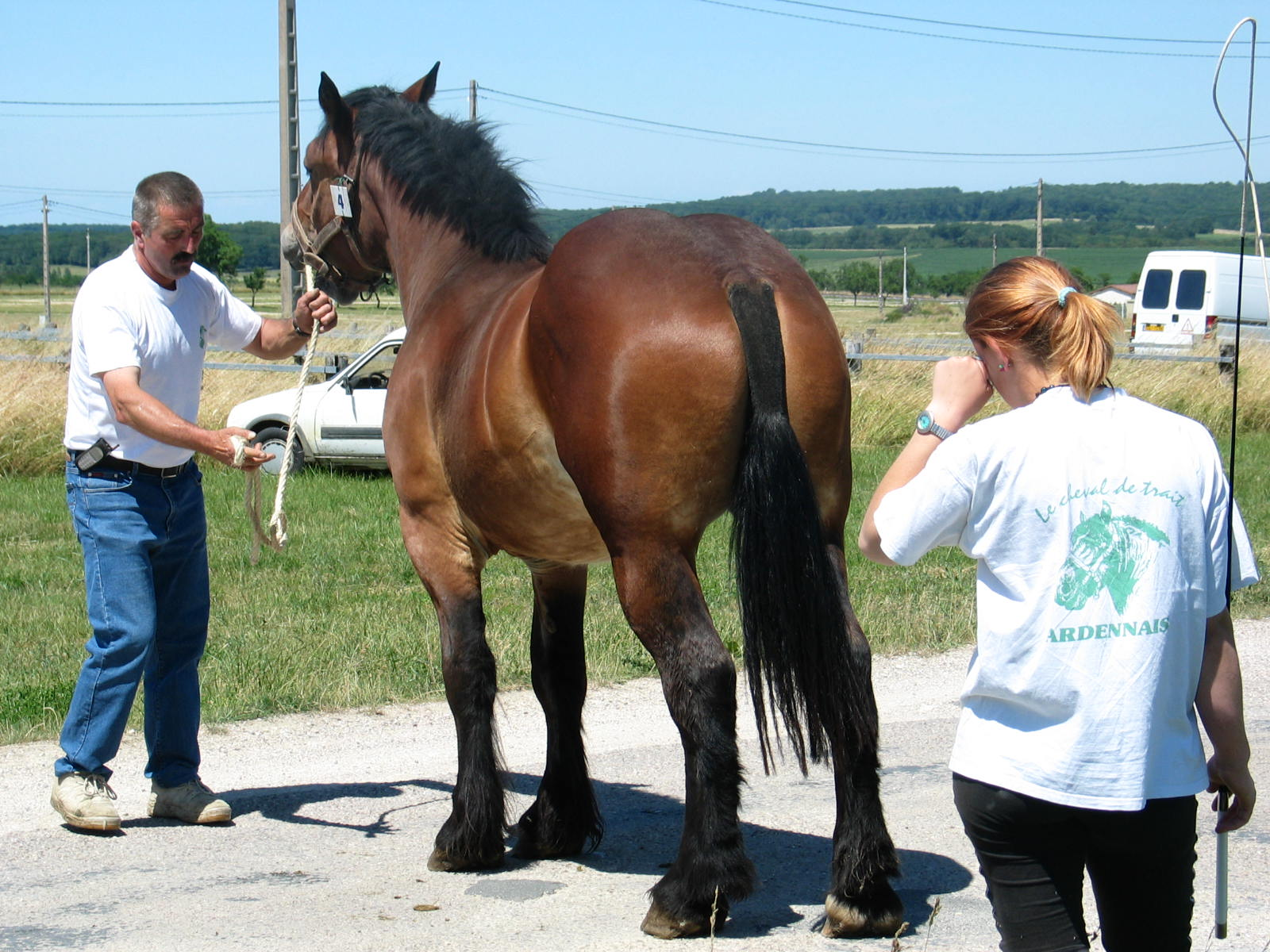 Cheval ardennais présenté lors d'un concours à Poussay (88)